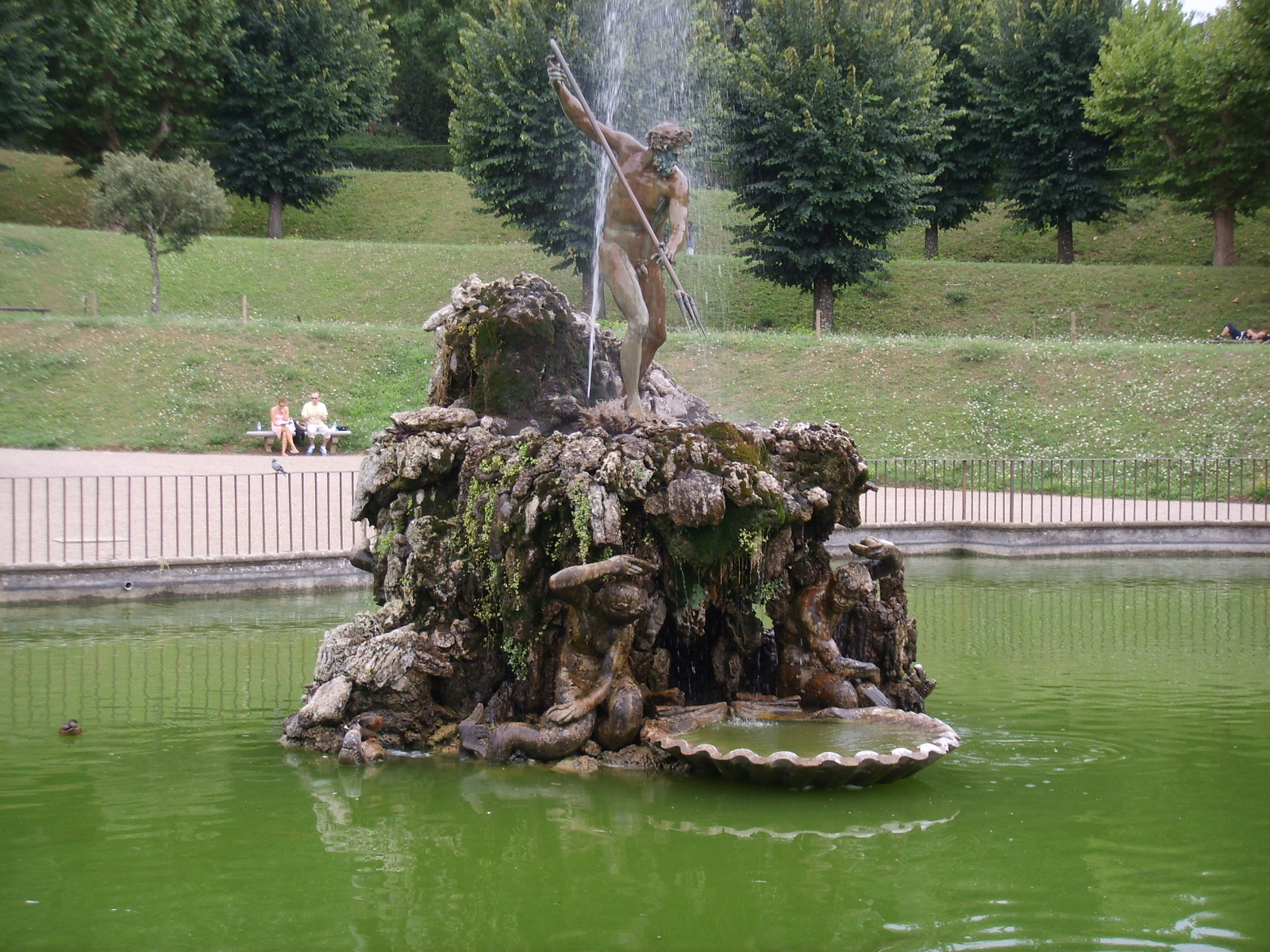 Boboli, fontana del tritone, stoldo lorenzi